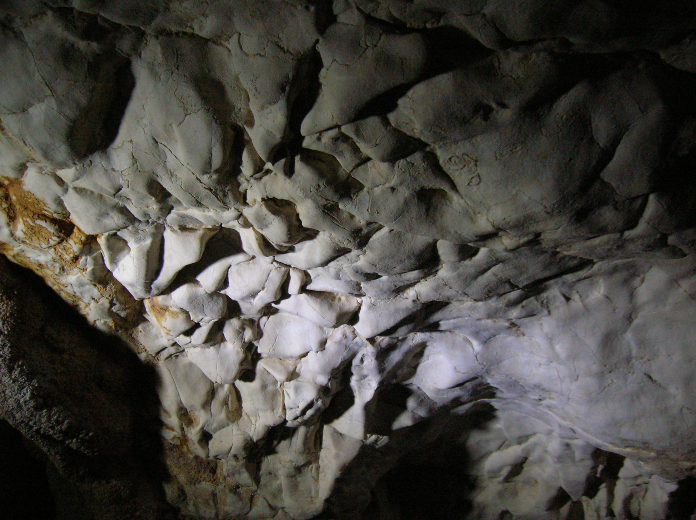 grotte de Thaïs, Saint-Nazaire-en-Royans, France.